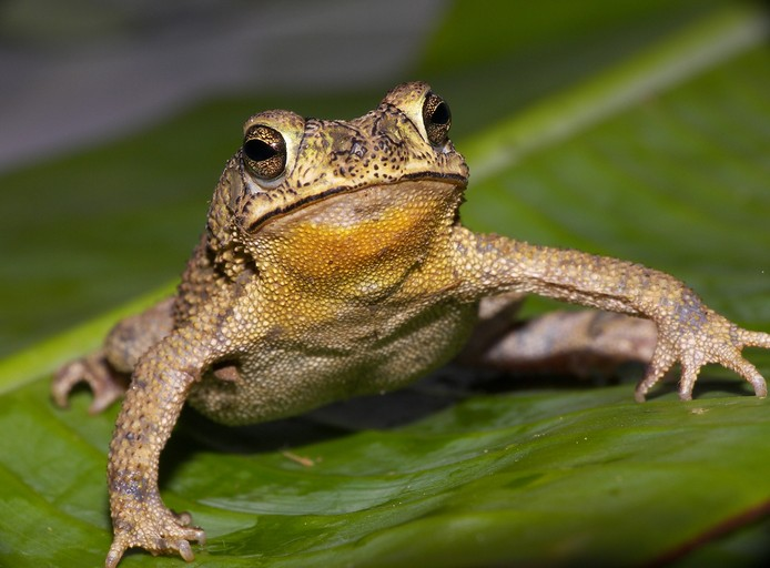 Bufo granulosus